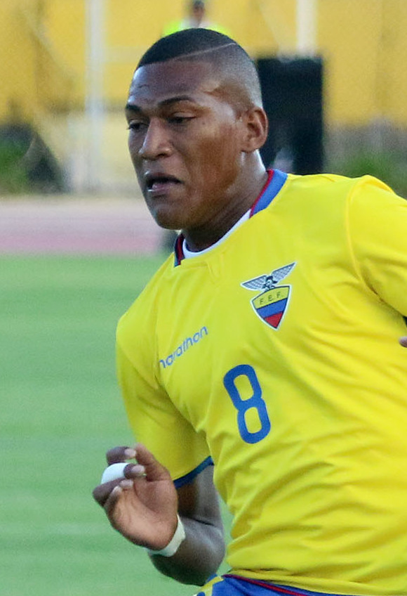 Quito, 08 de sept. (Andes).-Ecuador enfrenta a Honduras en partido amistoso jugado en el estadio Olimpico Atahualpa. En la gráfica Carlos Grueso (8) de Ecuador, disputa el balón con Brayan Mikeles (5) de Honduras. Foto:César Muñoz/Andes